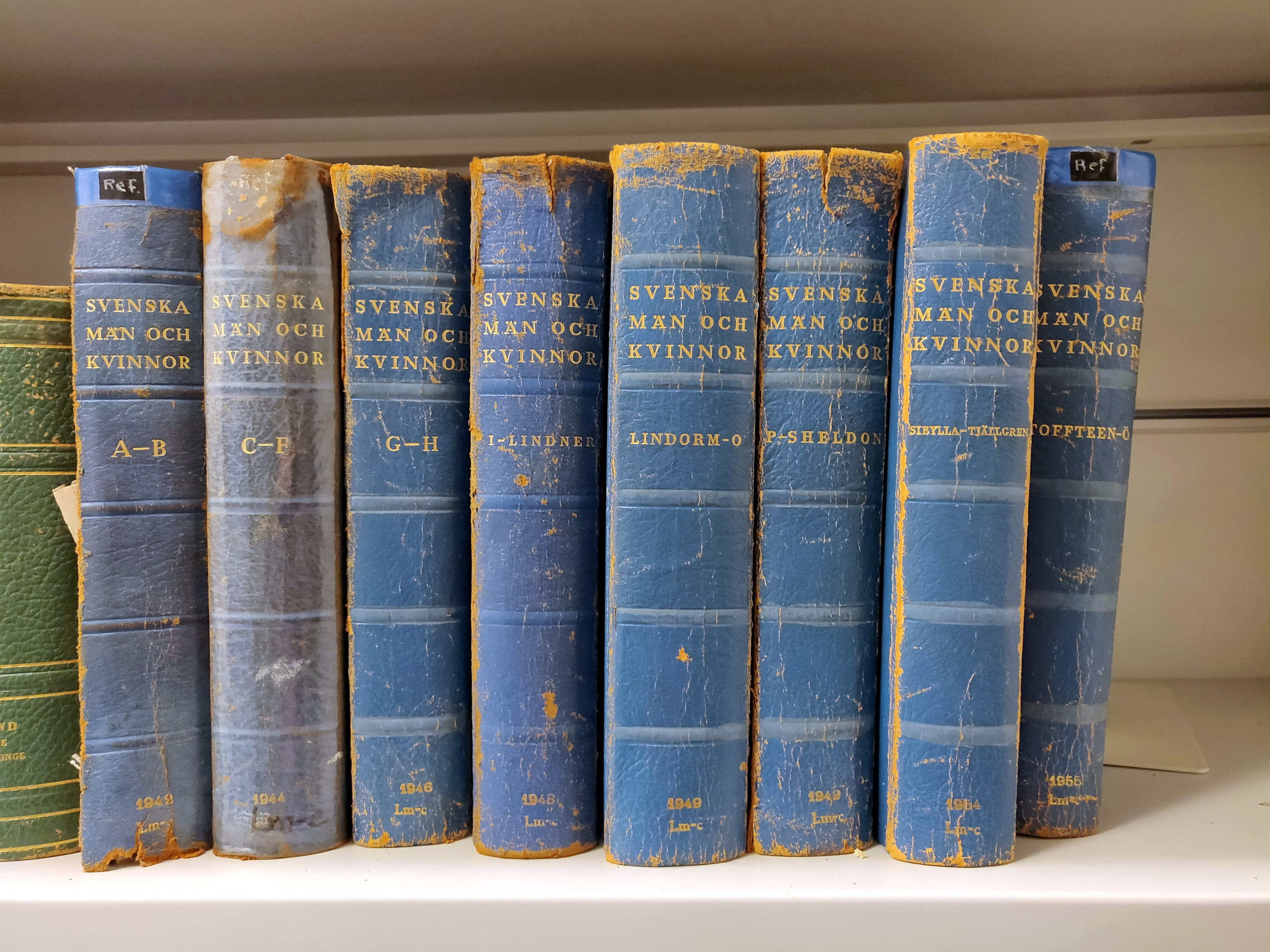 Det biografiska uppslagsverket Svenska män och kvinnor på Göteborgs Stadsbibliotek.